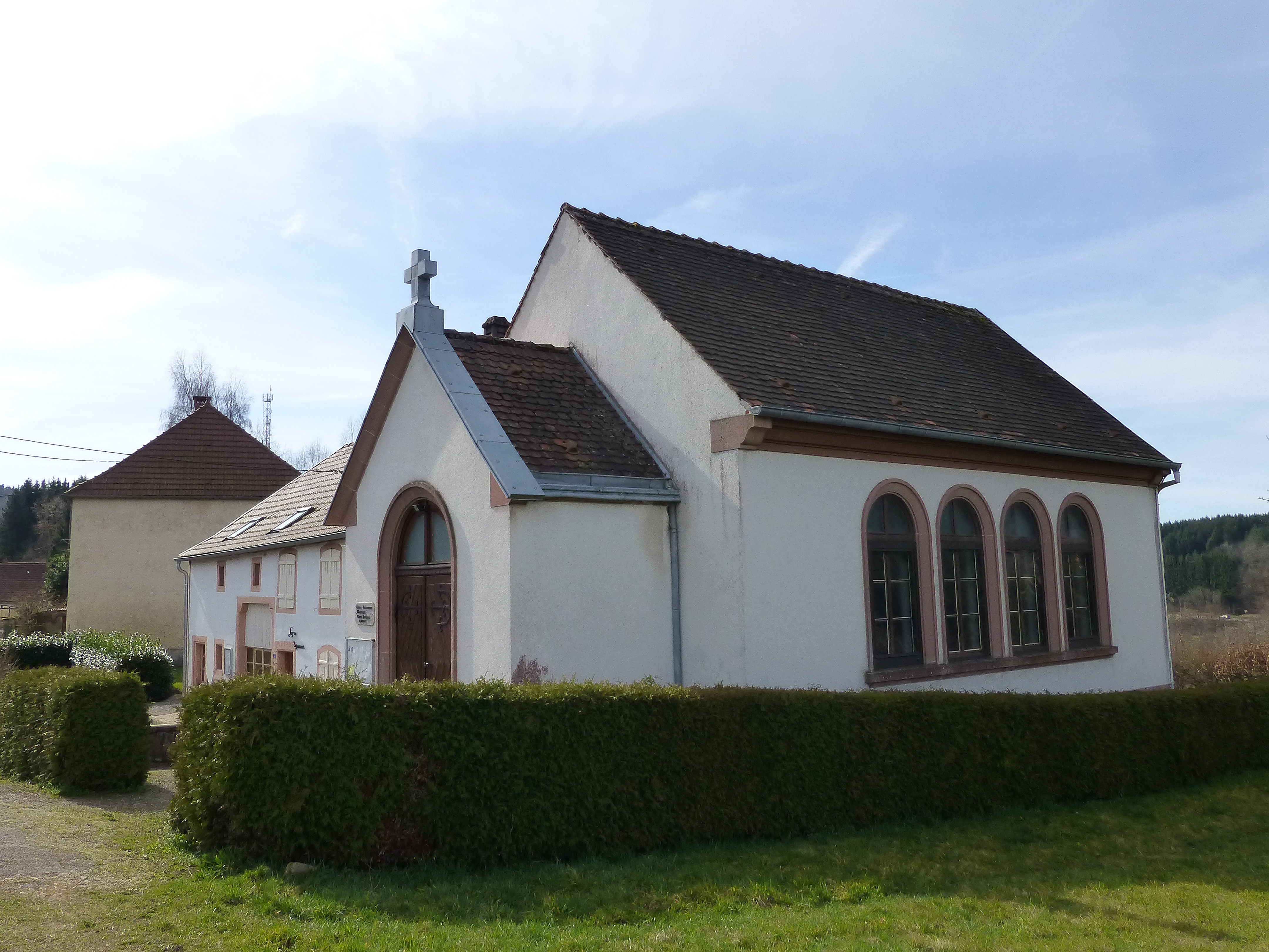 Bourg-Bruche (Bas-Rhin) : église évangélique mennonite